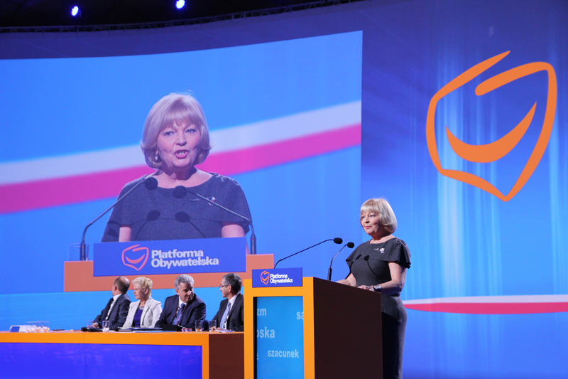 Hala Wystawiennicza "Kapelusz", Chorzów 29.06.2013 r.